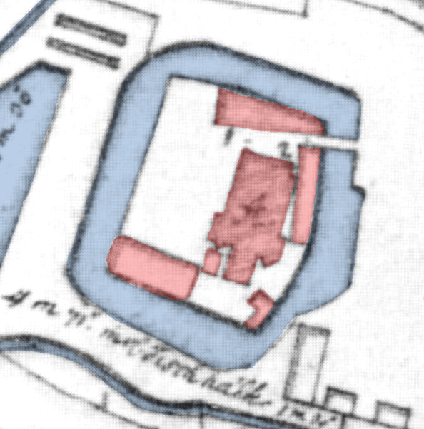 Burg Süpplingenburg auf Flurkarte von 1764, nachträglich koloriert